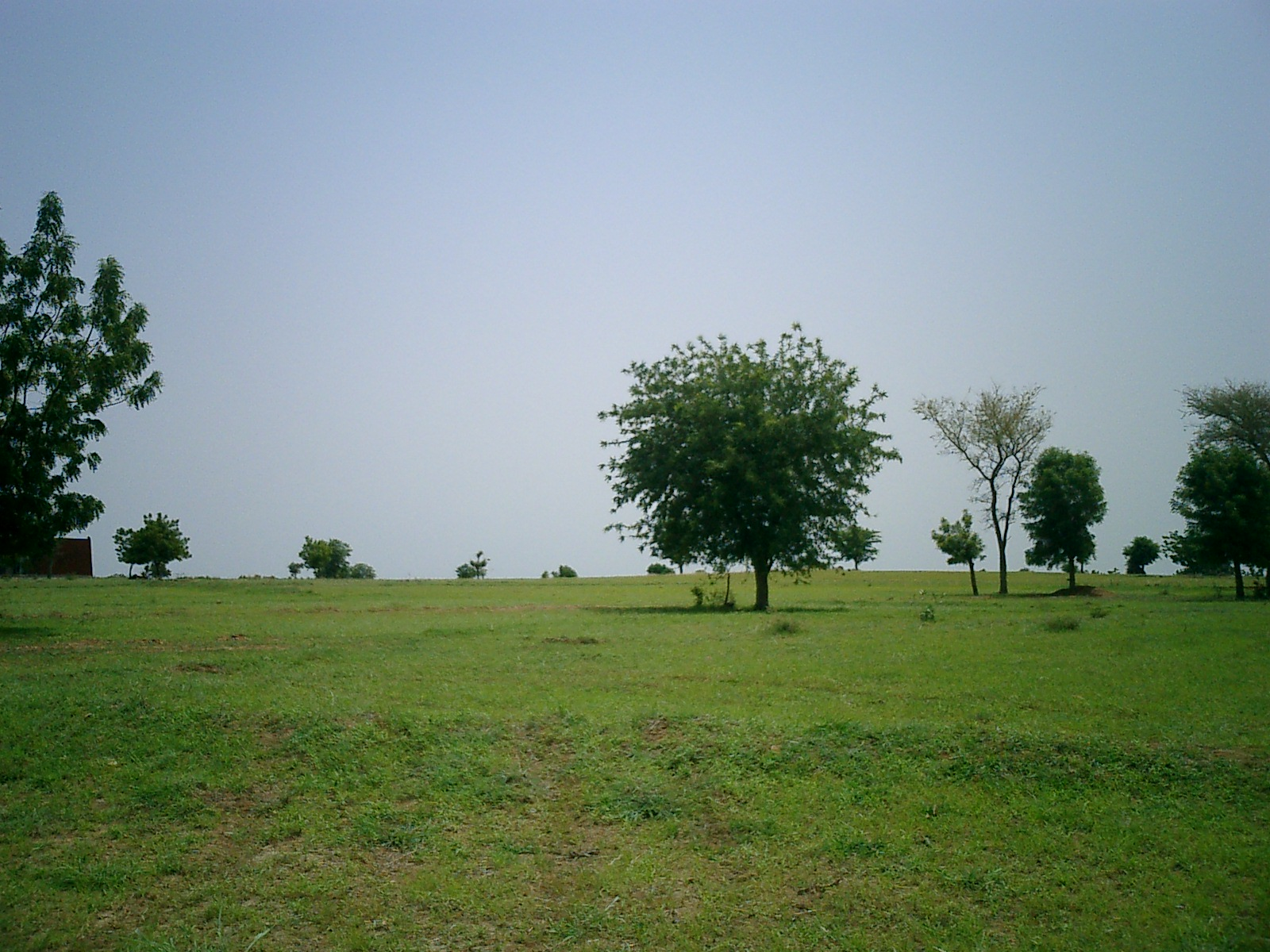 Regenzeit in Dourtenga